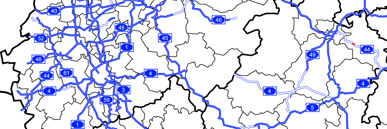 German federal highway 4 in context with county and state borders (Western part), Bundesautobahn 4 im Kontext anderer Autobahnen und Landkreis- und Ländergrenzen (Westteil)